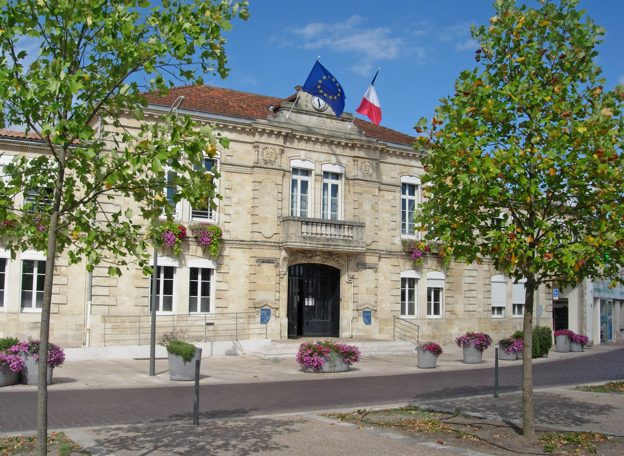 Vue de la mairie du Bouscat, en Gironde.